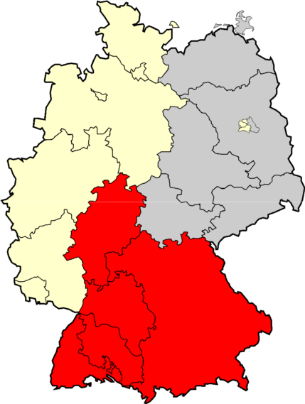 Carte localisant l'Oberliga Sud (1947-1963) Catégorie:Compétition de football en Allemagne